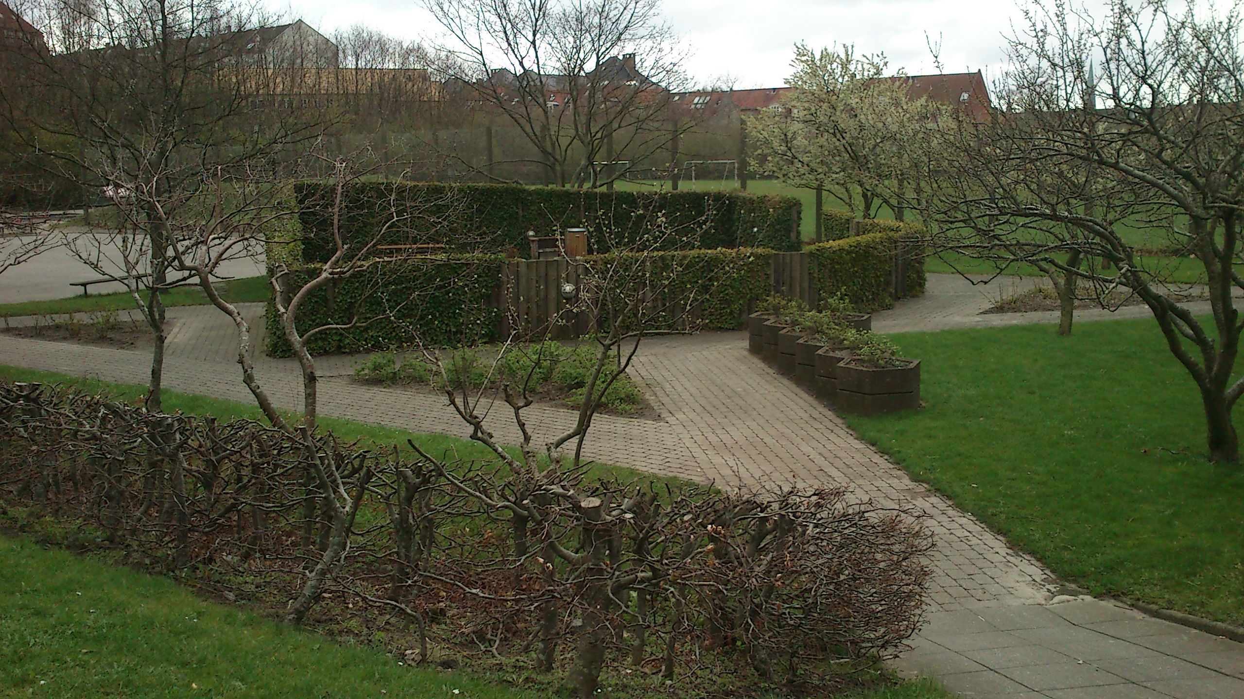 Vue over grillpladsen og lunden i Klostervangen først i april. Bøgehækkene er lige blevet beskåret som det ses nederst i billedet.